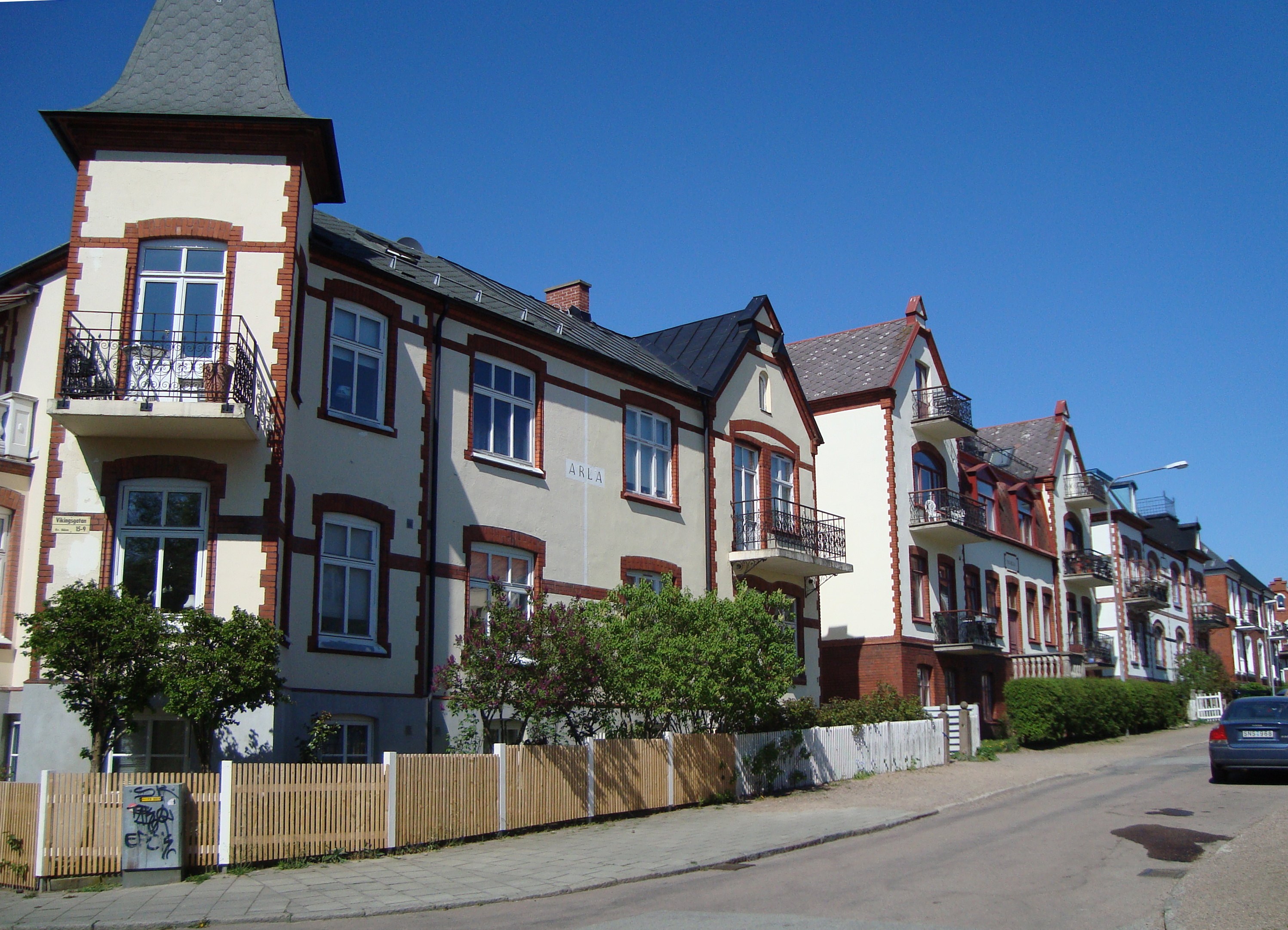 Egnahemsbostäder på Tågaborg i Helsingborg.